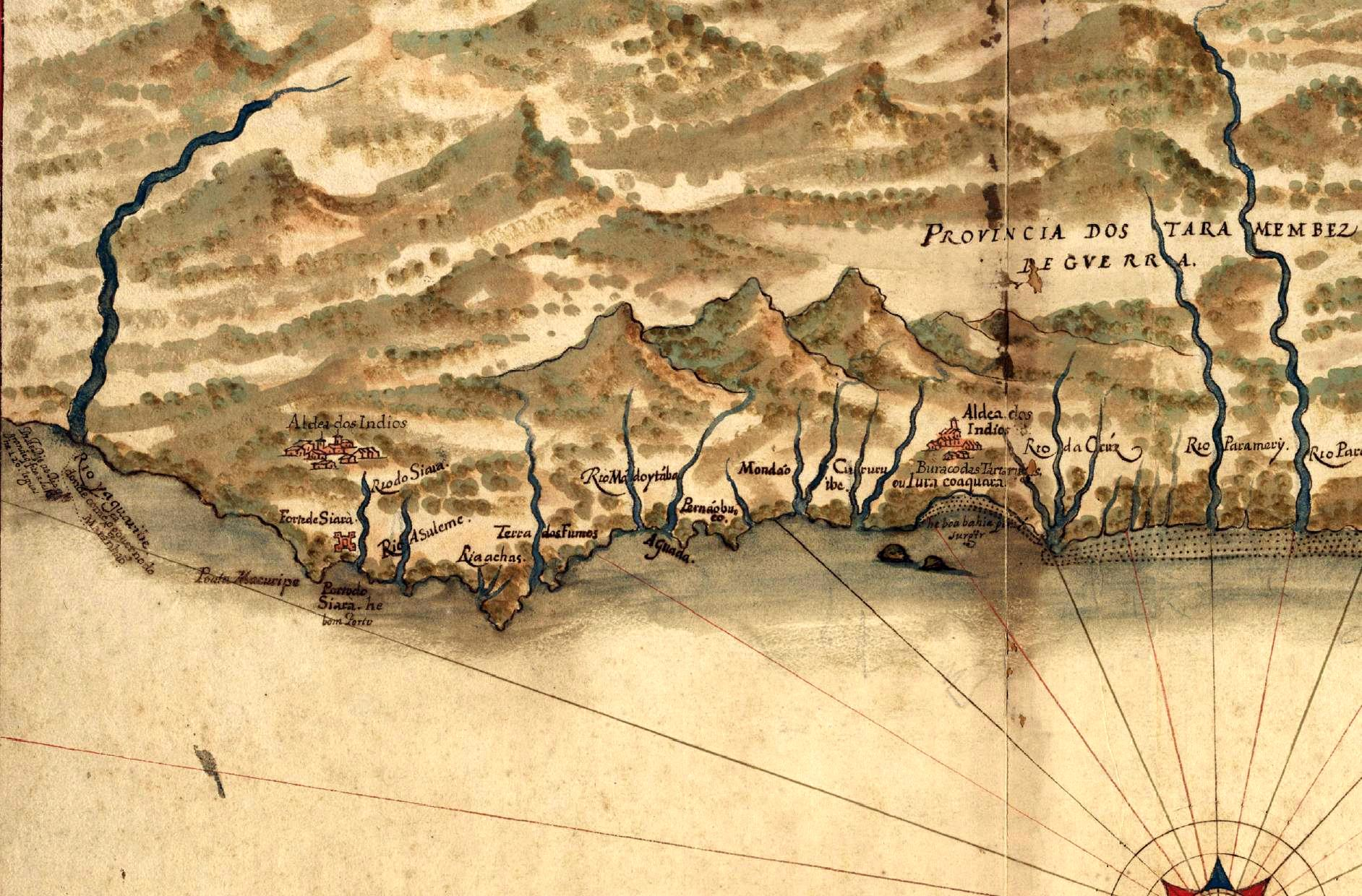 Imagem parcial do "Pequeno atlas do Maranhão e Grão-Pará" mostrando apenas o litral do Ceará.